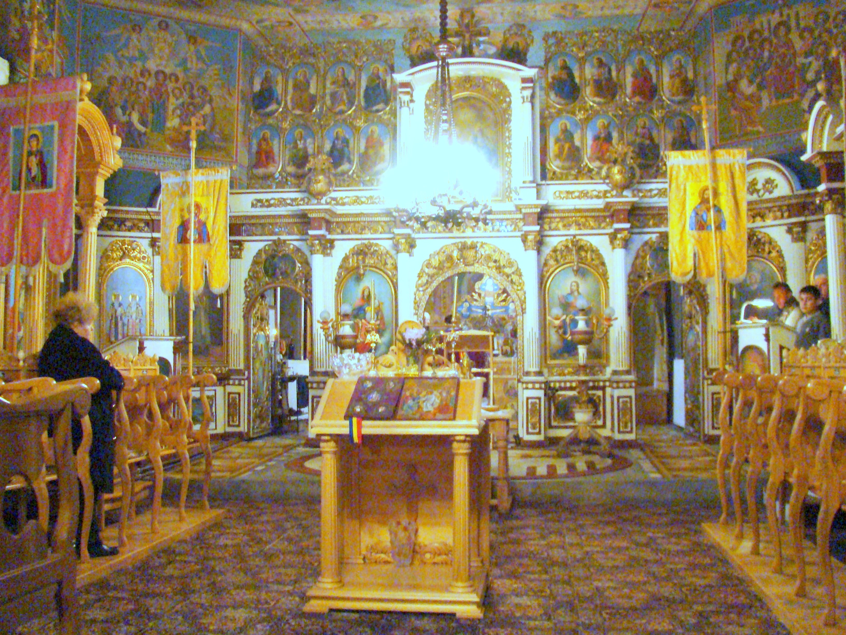 Biserica "Bunavestire" din Lipova, județul Arad